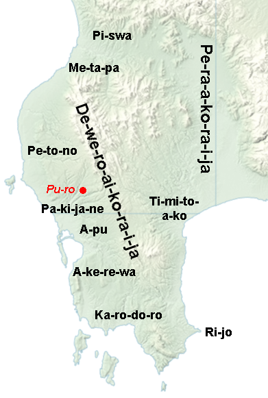 Karte der Provinzen des bronzezeitlichen Reichs Pylos in Messenien. Quelle: John Chadwick: Die Mykenische Welt, Stuttgart 1979. ISBN 3-15-010282-0